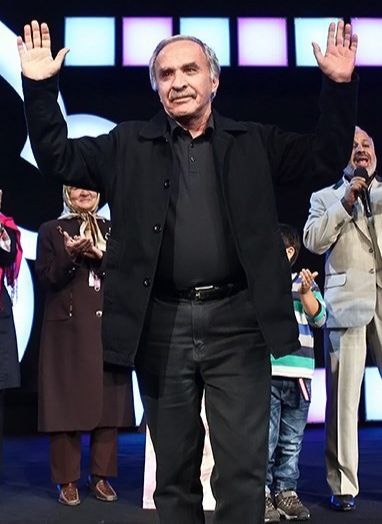 ابراهیم فروزش - مهر ۱۳۹۲